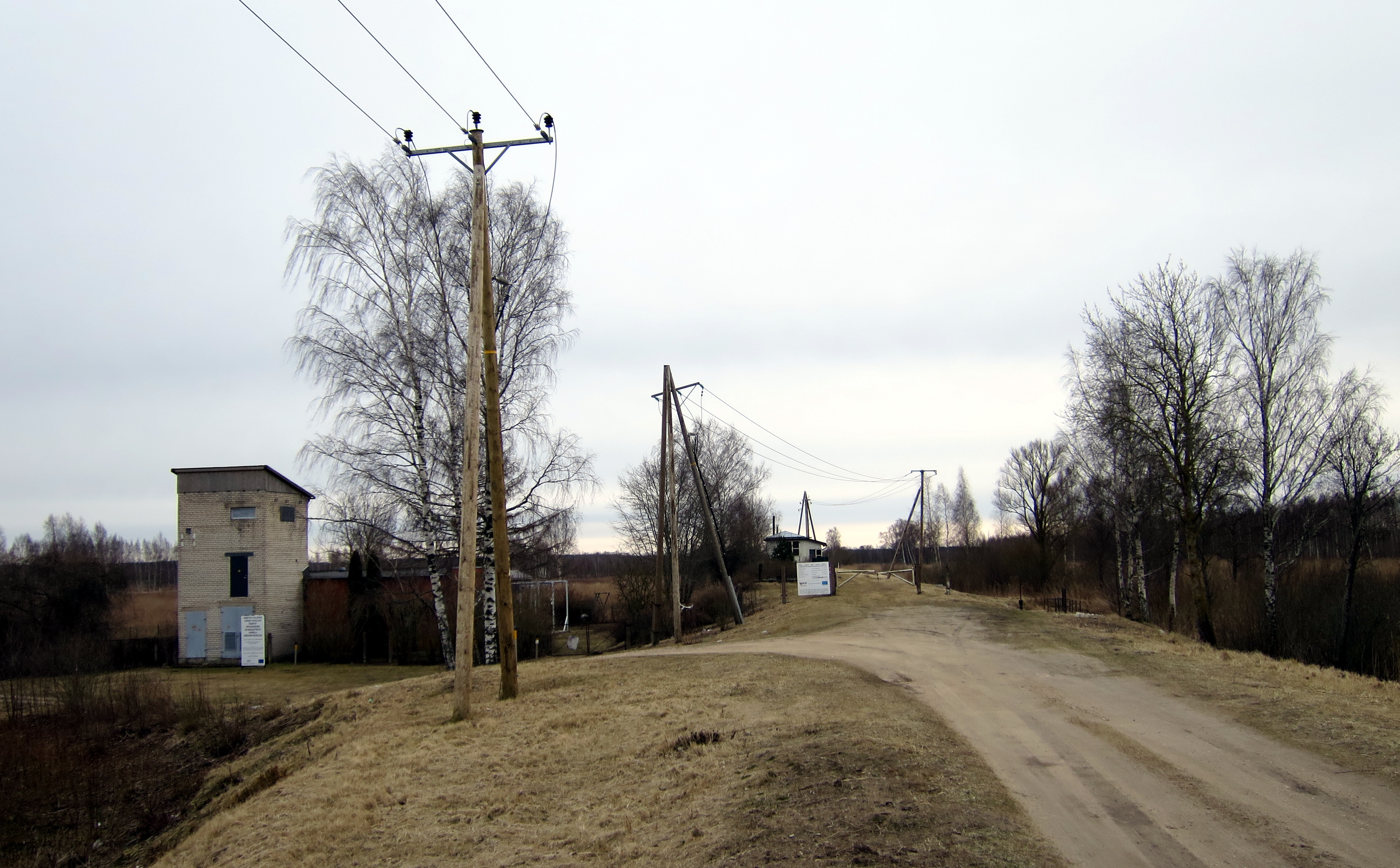 Babītes poldera sūkņu stacija